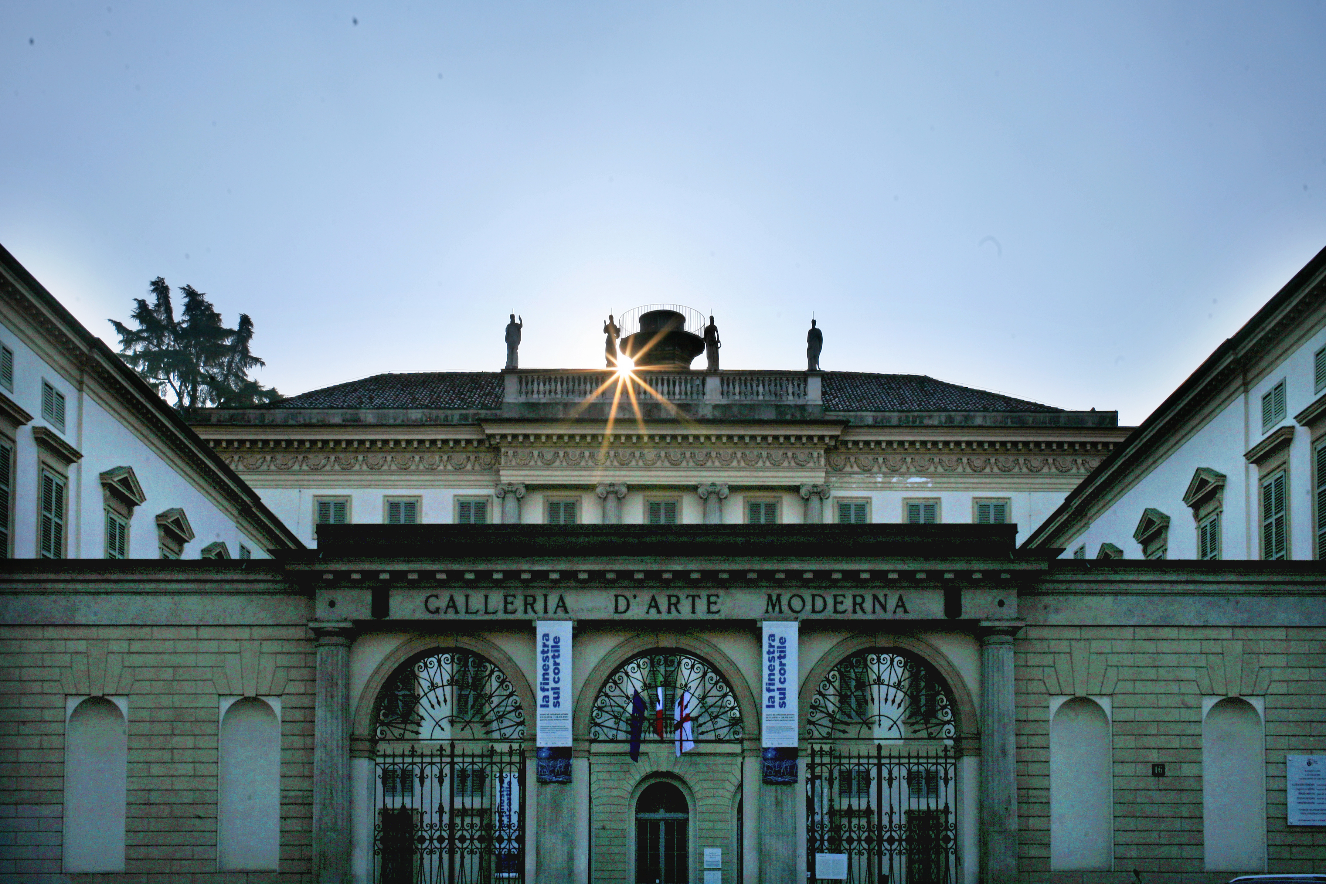 La Galleria d'Arte Moderna di Milano GAM al tramonto